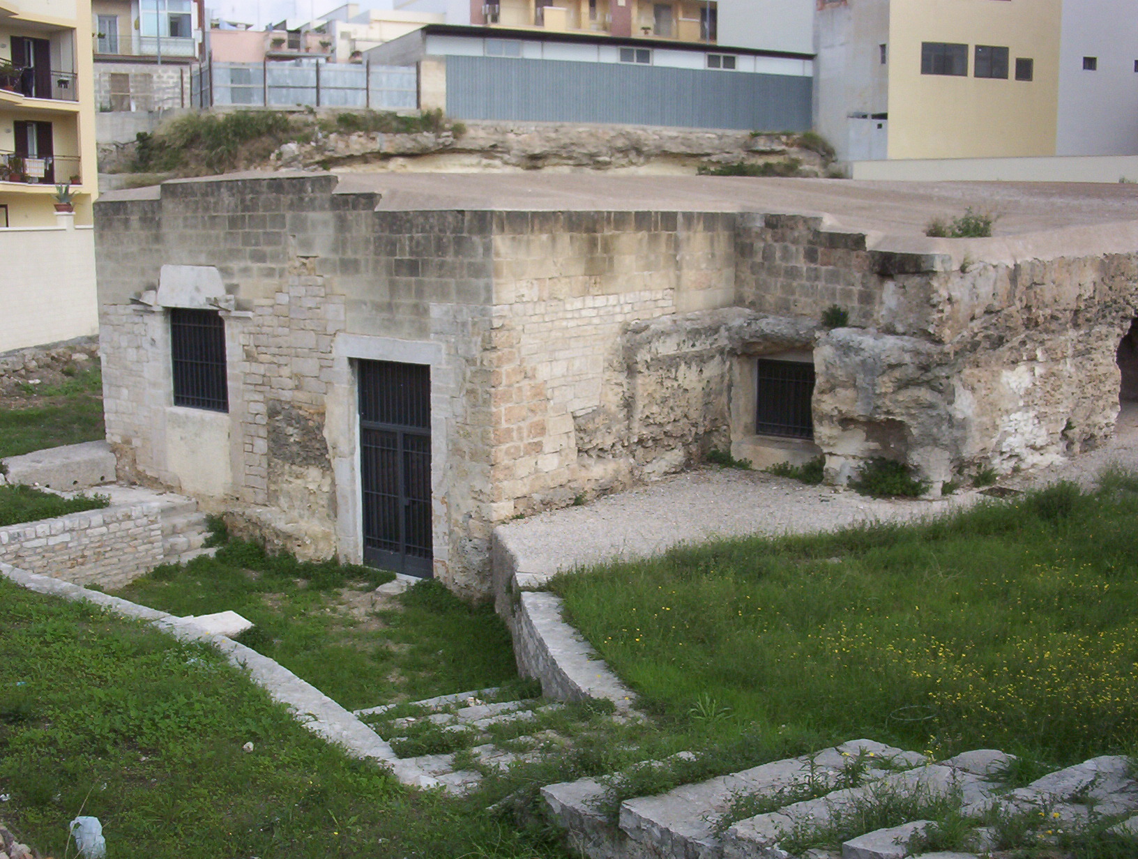 Foto amatoriale scattata da me - Autorizzo la pubblicazione su Wikipedia